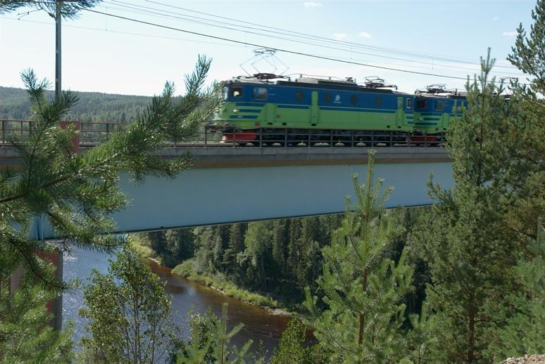 Tredje bron. Den nya järnvägsbron togs i bruk 1994. Det är en samverkansbro i sex spann i stål och betong.; Bro; Byggnadsverk; Kommunikationsväsen